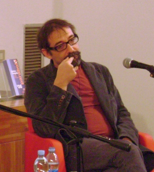 Emanuele Trevi, Sala conferenze Biblioteca Delfini, Modena